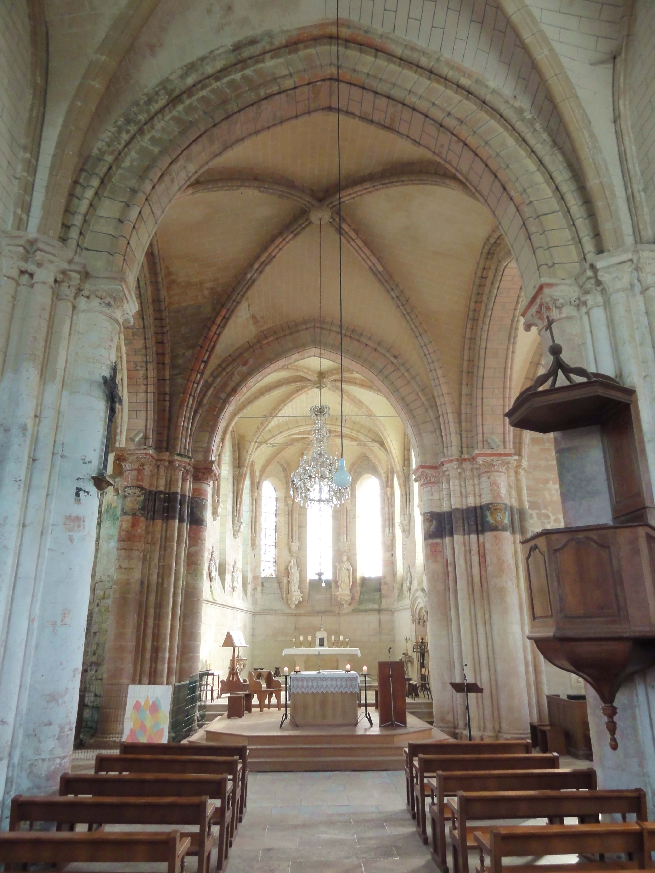 Intérieur de l'église - voir titre.